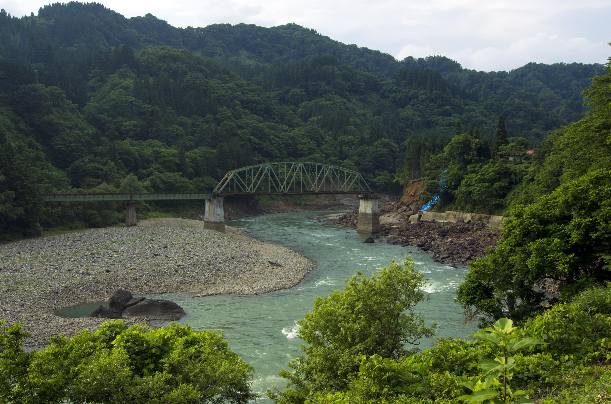 JR只見線第五只見川橋梁